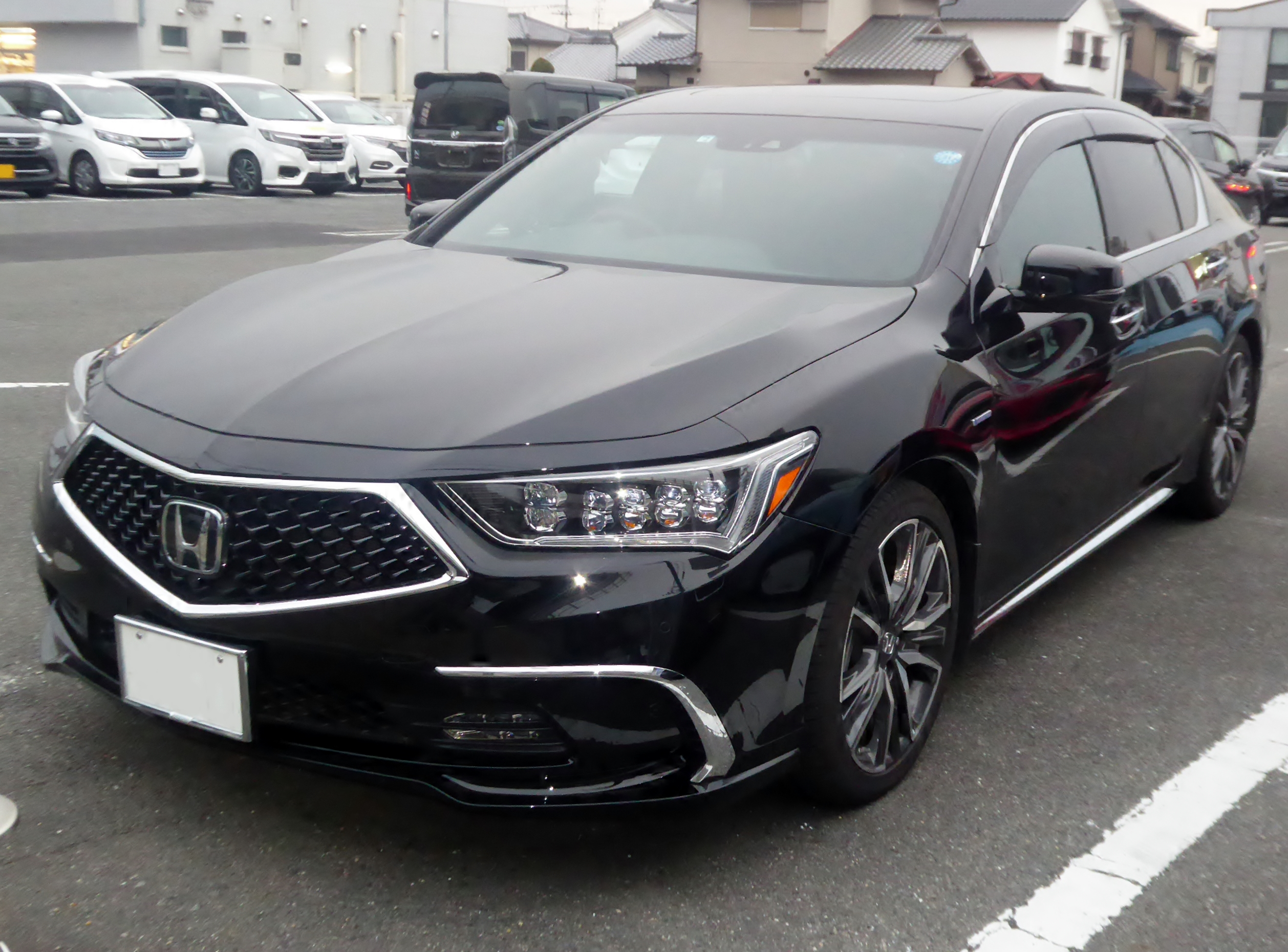 DAA-KC2型ホンダ・レジェンドHybrid EXを撮影。